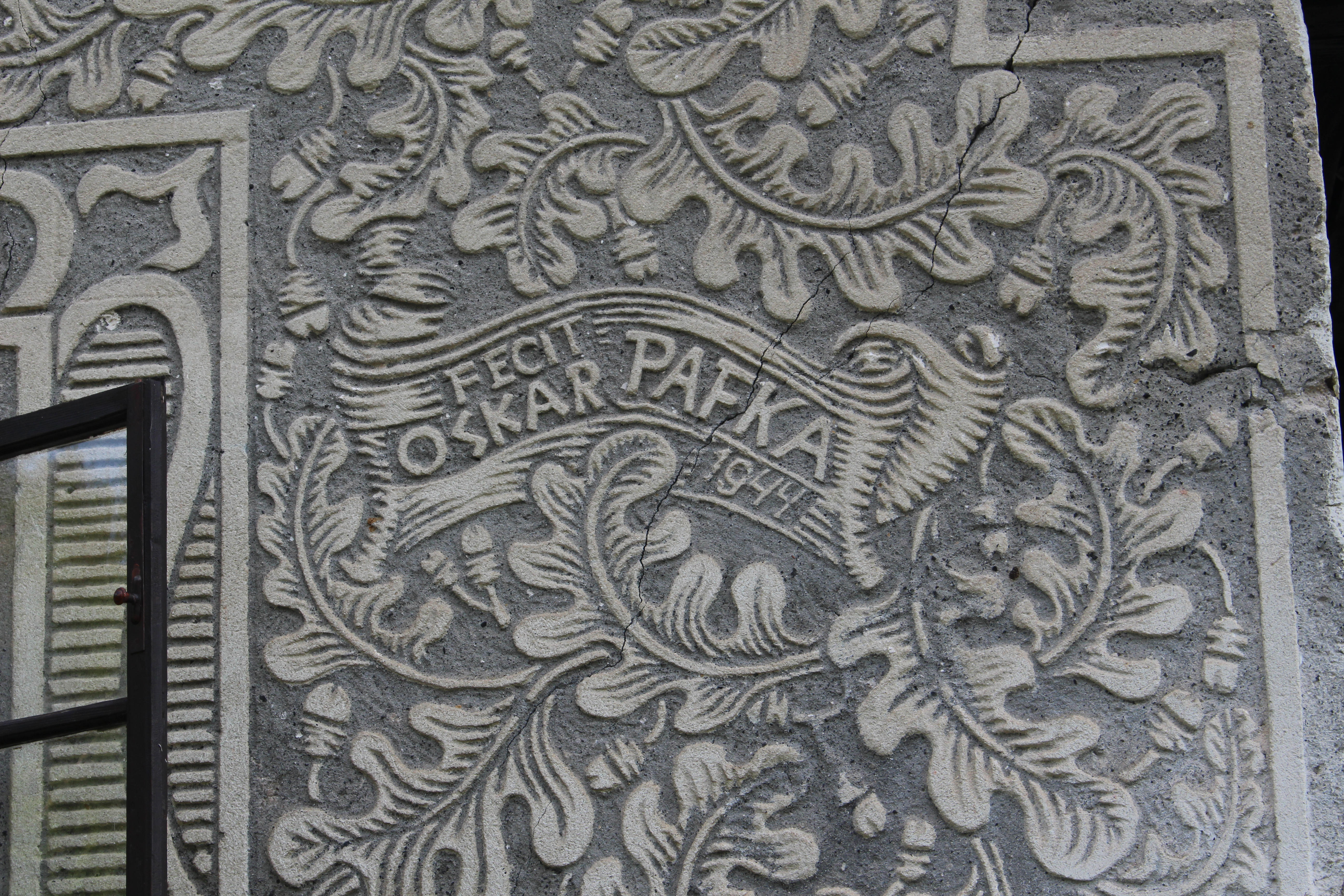 Bauernhaus Christenthal